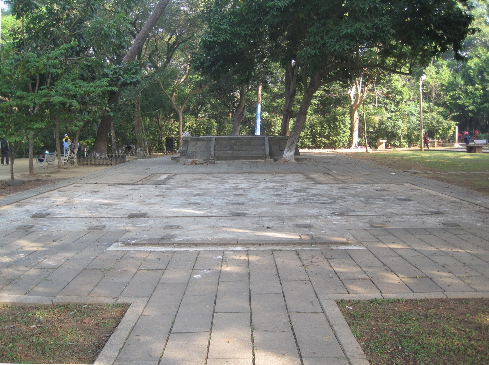 中文（台灣）: 第一代嘉義神社的遺跡。